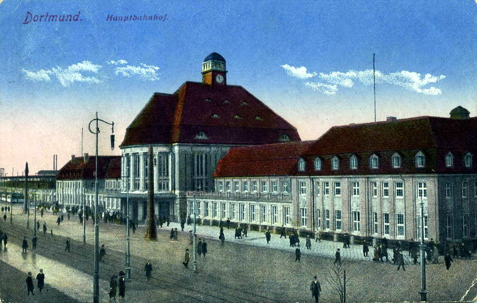 Historische Postkarte, Dortmund Hauptbahnhof